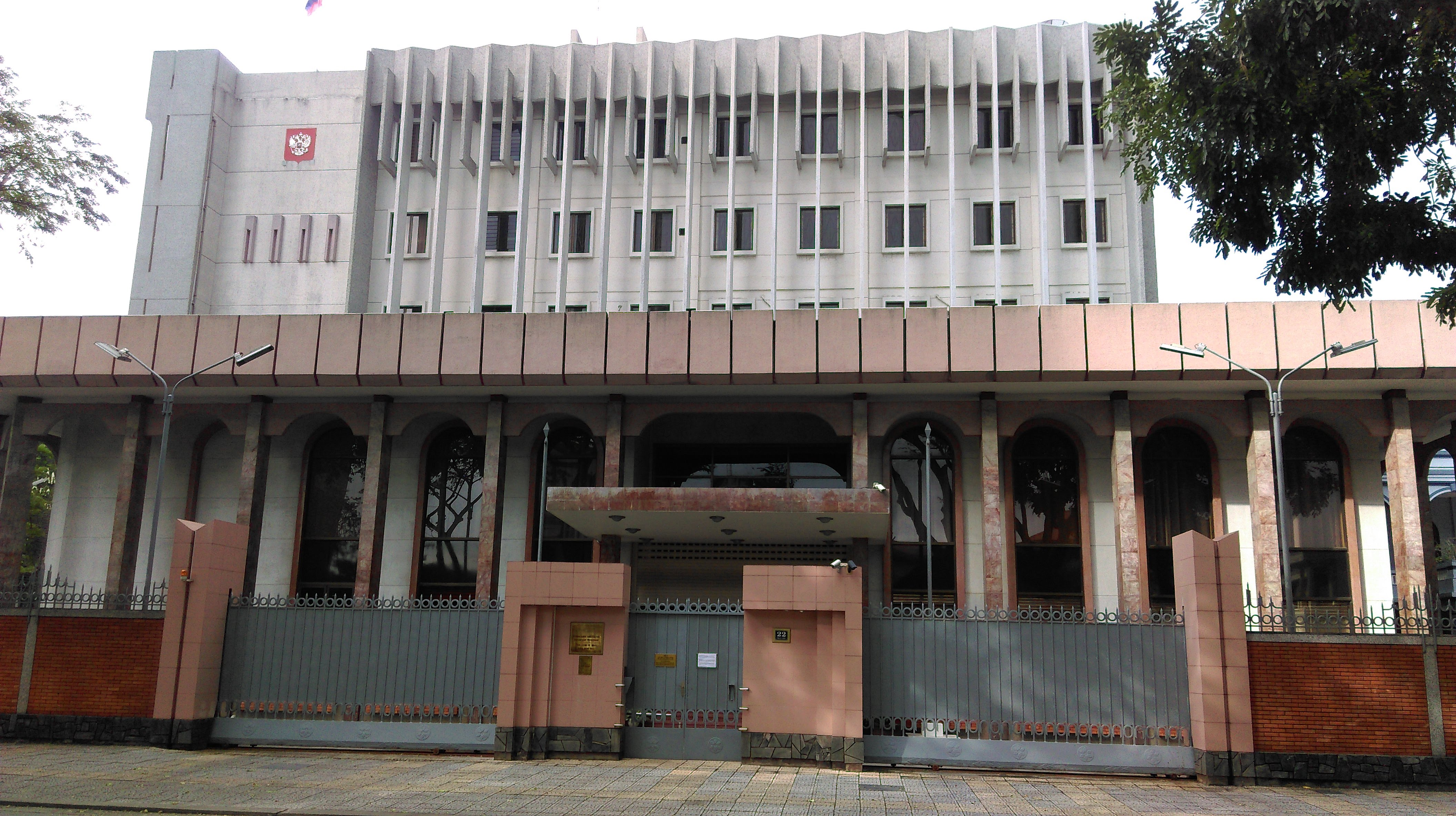 Lãnh sự quán Nga, Đà Nẵng